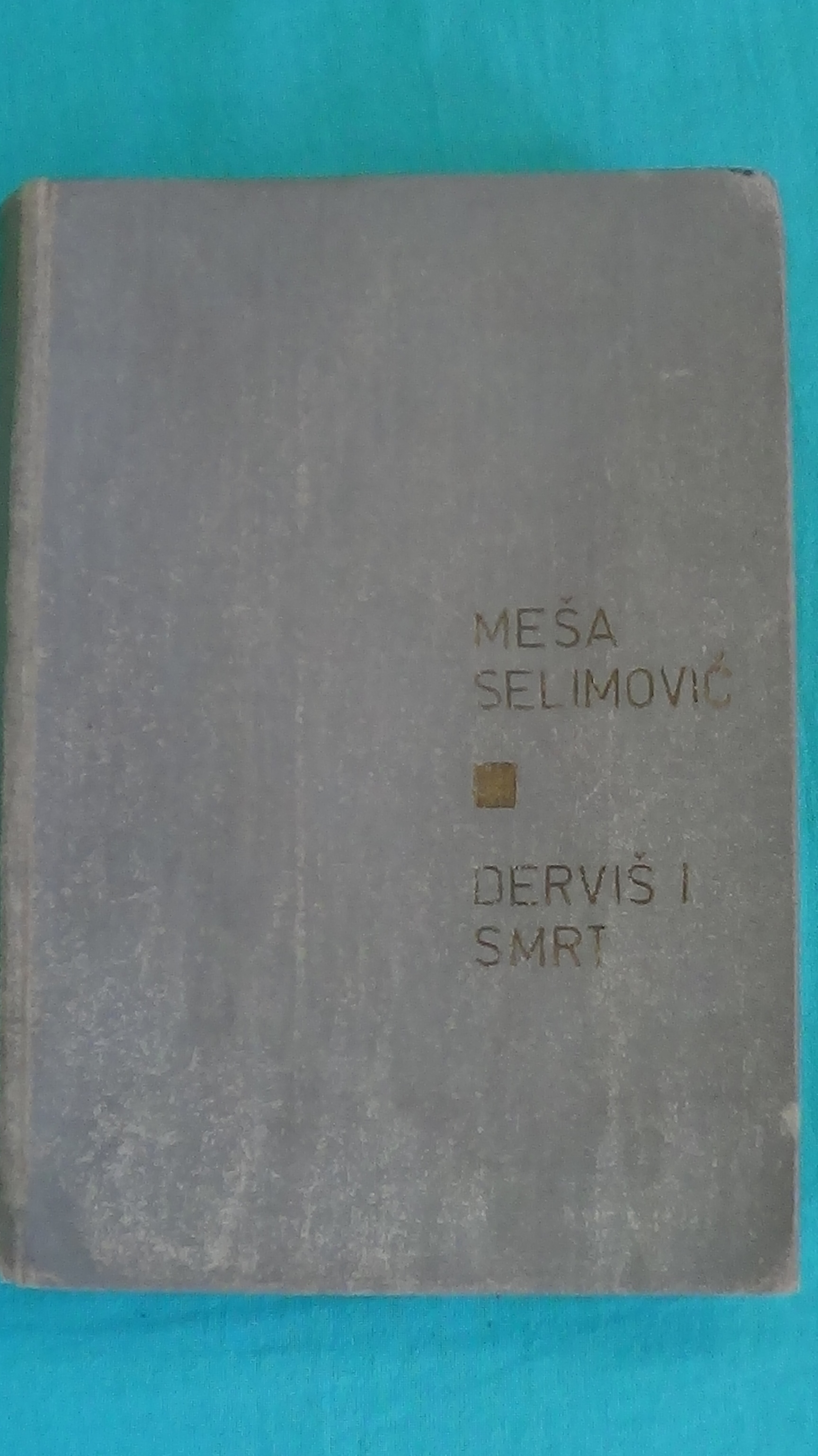 Корицата на „Дервишот и смртта“, второ издание (1967).